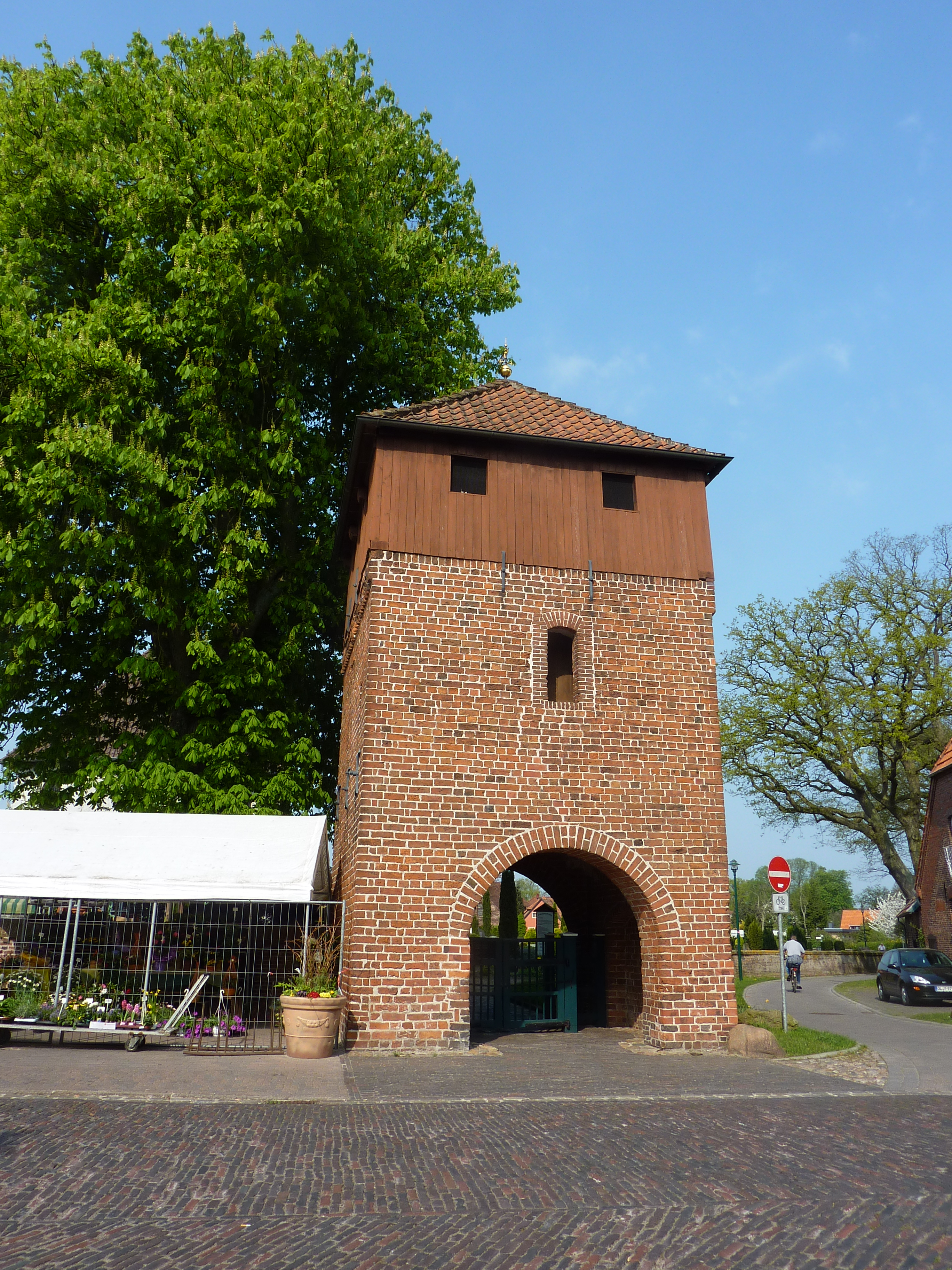 Glockenturm in Wardenburg